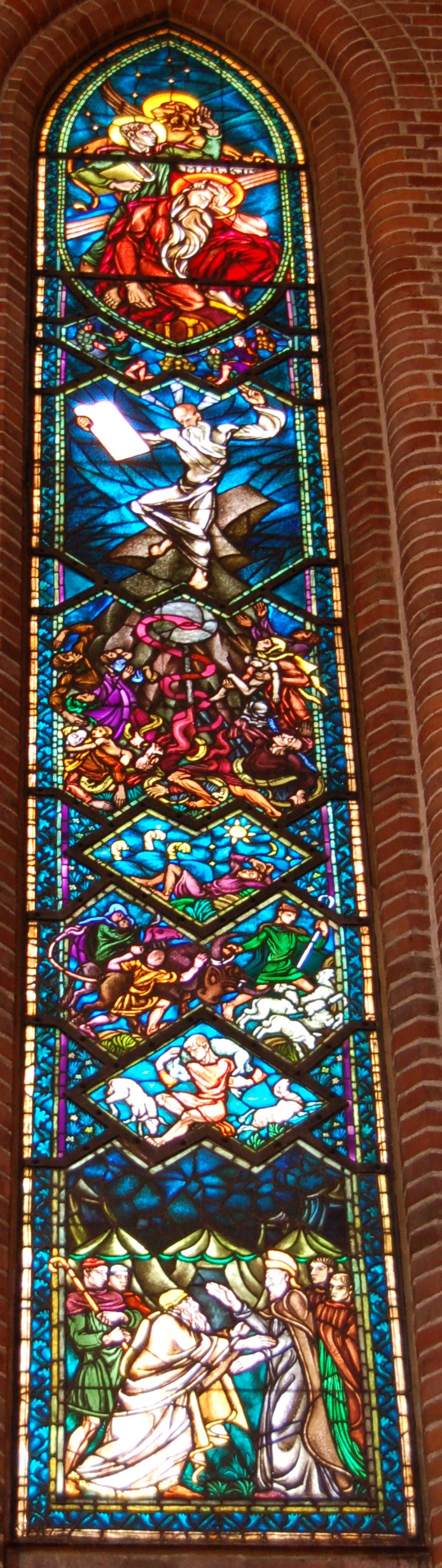 Glassmaleri fra Trefoldighetskirken i Oslo: Israels historie